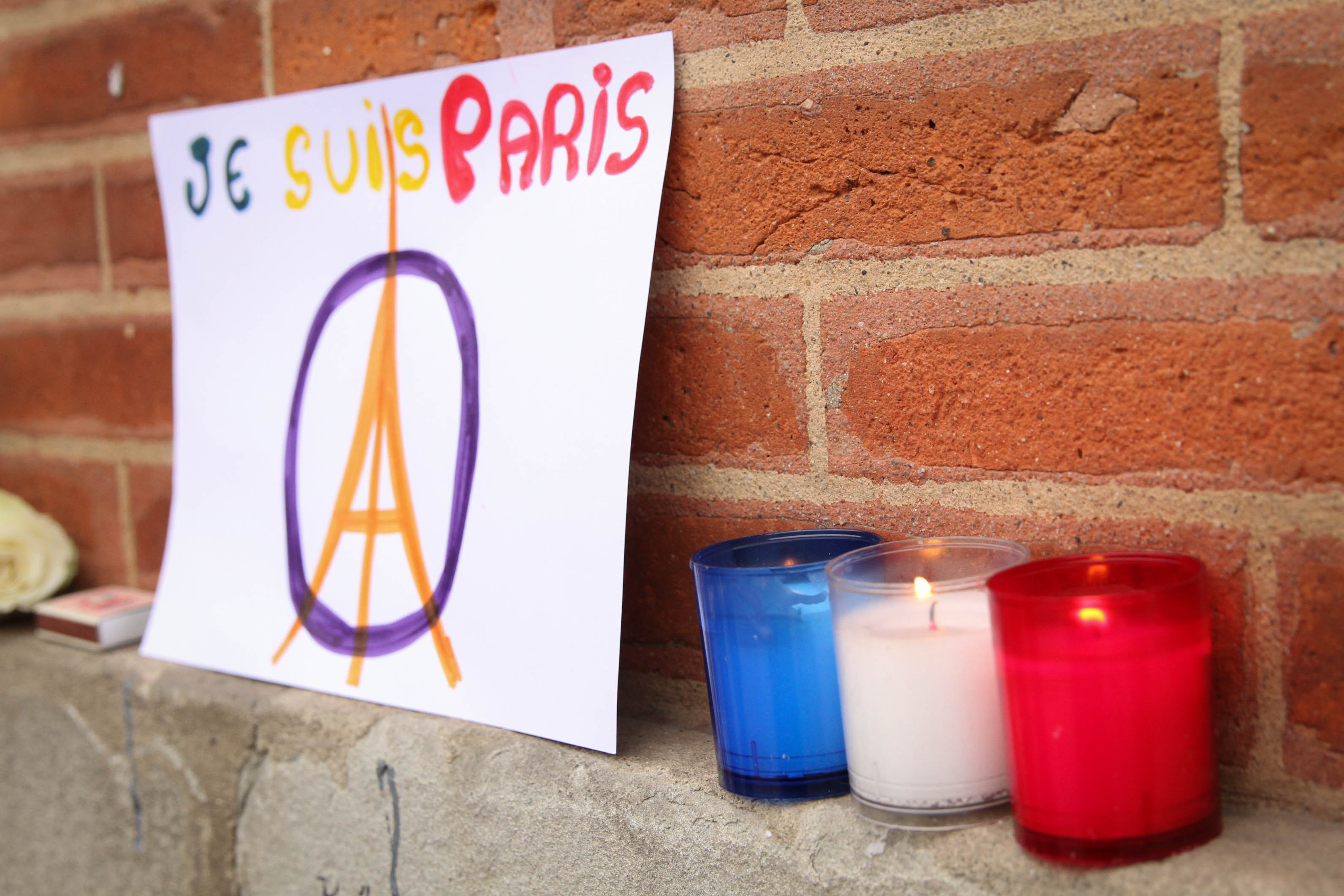 Rassemblement à Toulouse en hommage auc victimes des attentats du 13 novembre 2015